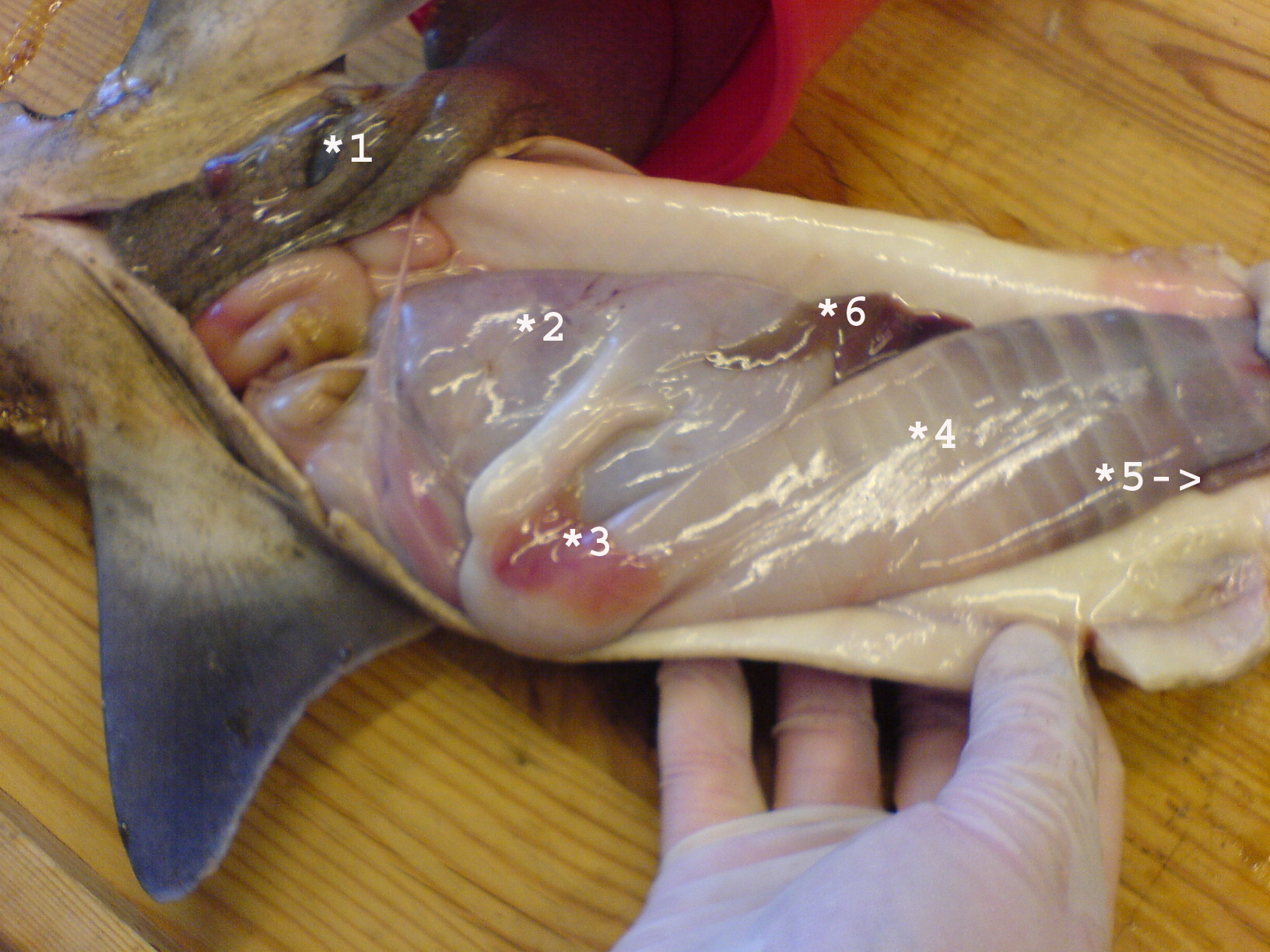 Pigghåens indre organer. 1: Lever 2: Magesekk 3: Bukspyttkjertel 4: Tarm 5: Rektal kjertel 6: Milt Bildet er tatt av meg selv 20 september 2005.